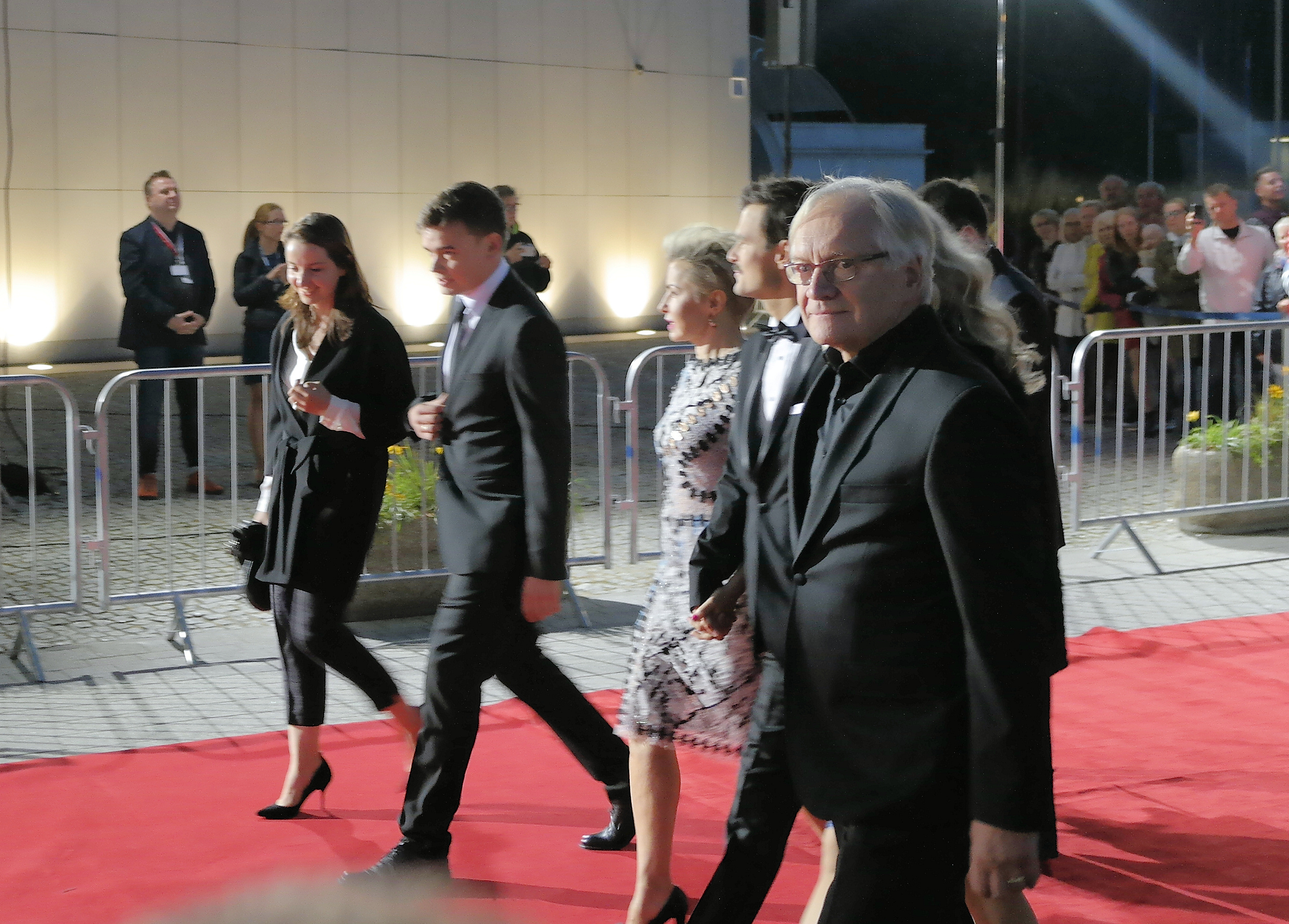 Czerwony dywan przed zakończeniem Festiwalu Filmowego w Gdyni 2016